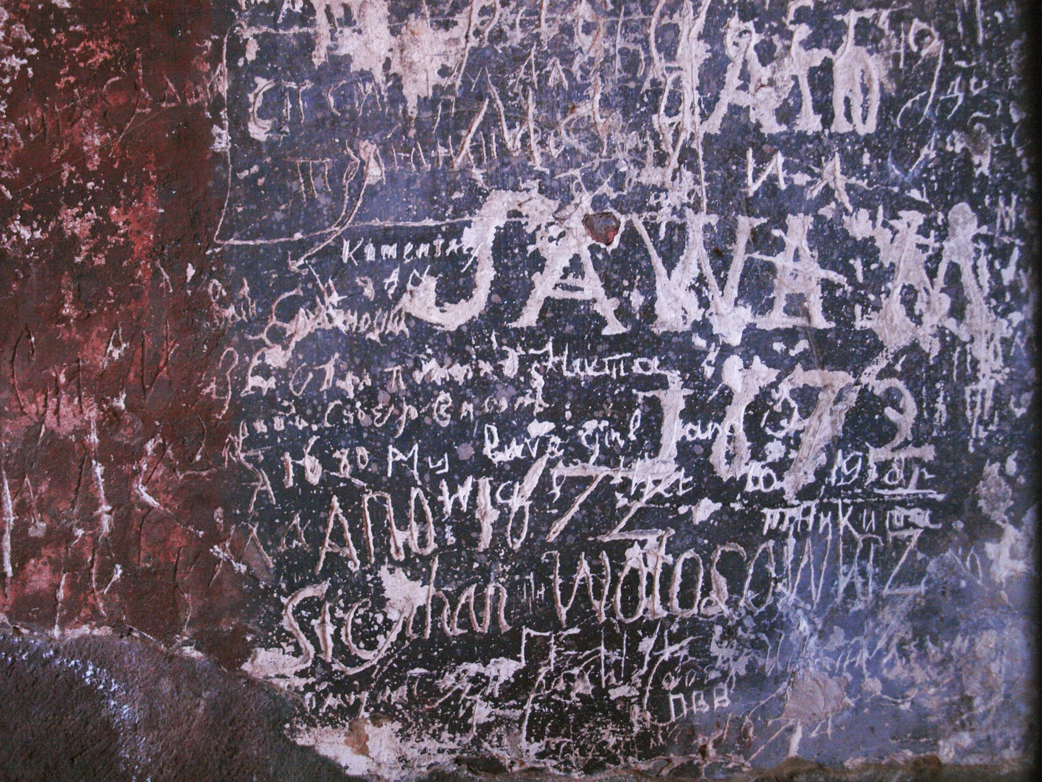 Графіті на стінах. Церква Спаса на Берестові, Київ, вул. Лаврська, 5